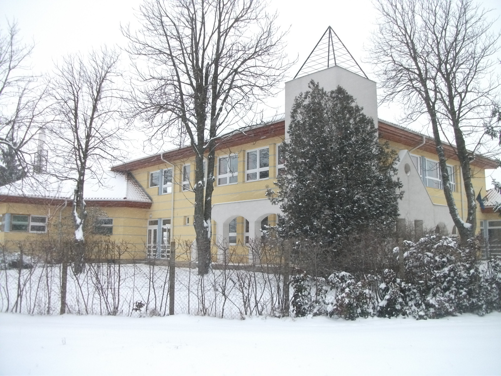 Zichyújfalu általános iskolája.